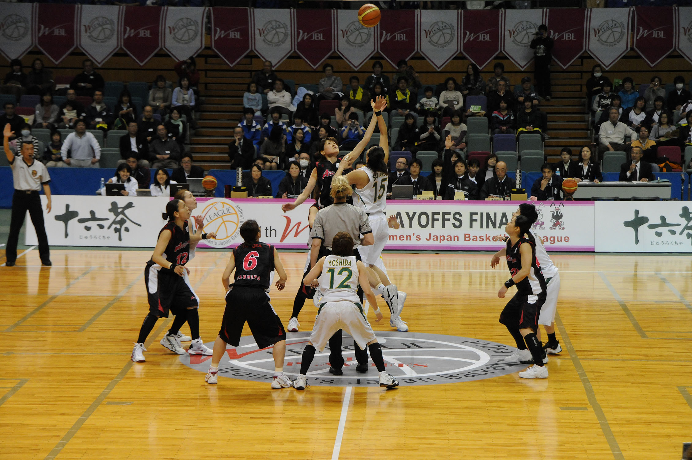 WJBL 09-10プレーオフファイナル、トヨタ対JOMO。ぐんまアリーナで。